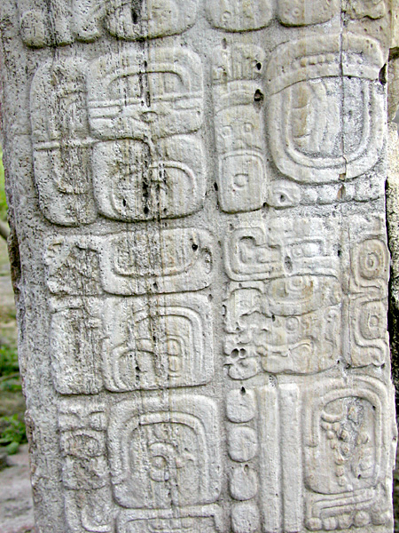 Stone engravings, Tikal, Guatemala. Image taken by Clark Anderson/Aquaimages. Category:Tikal